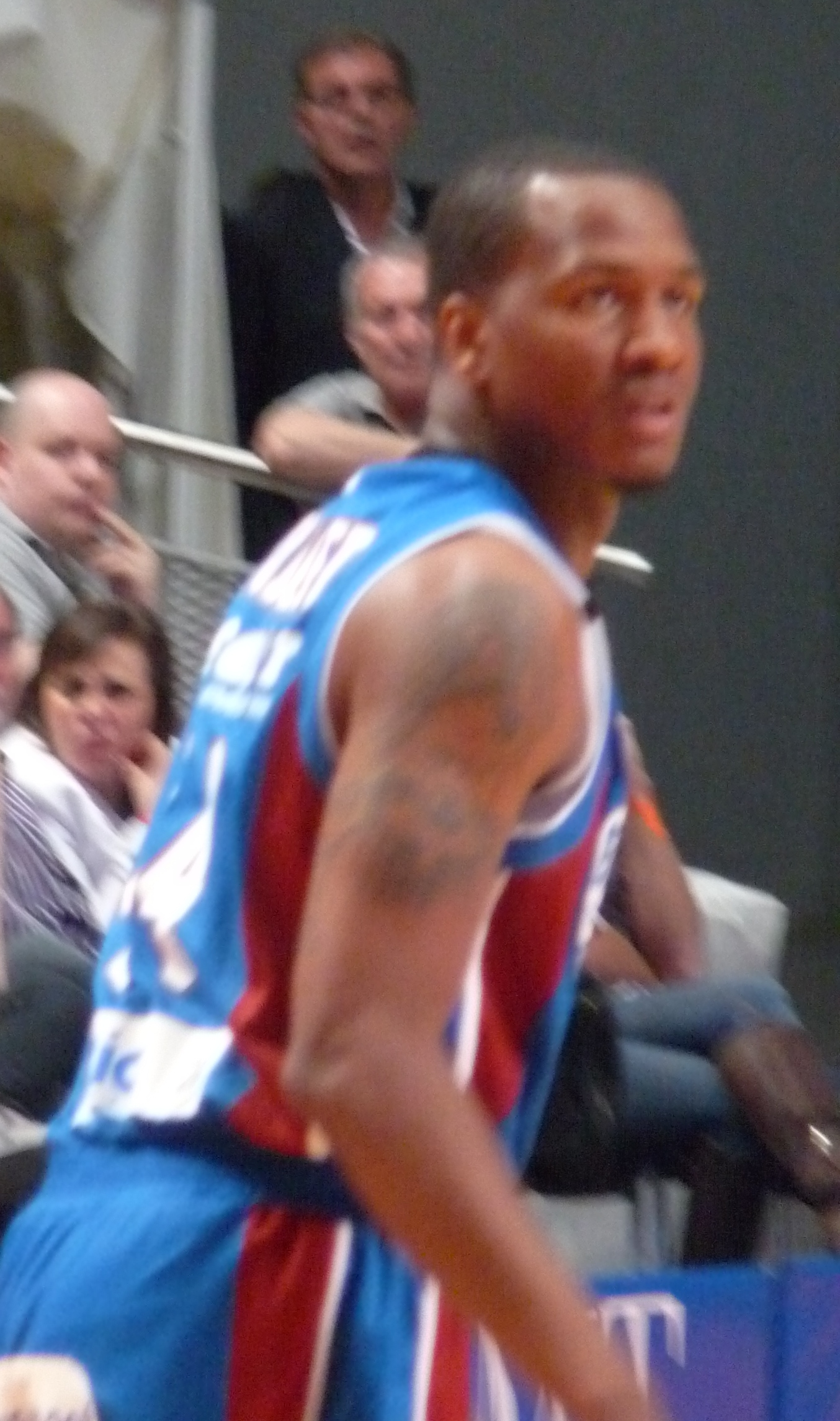 William Buford